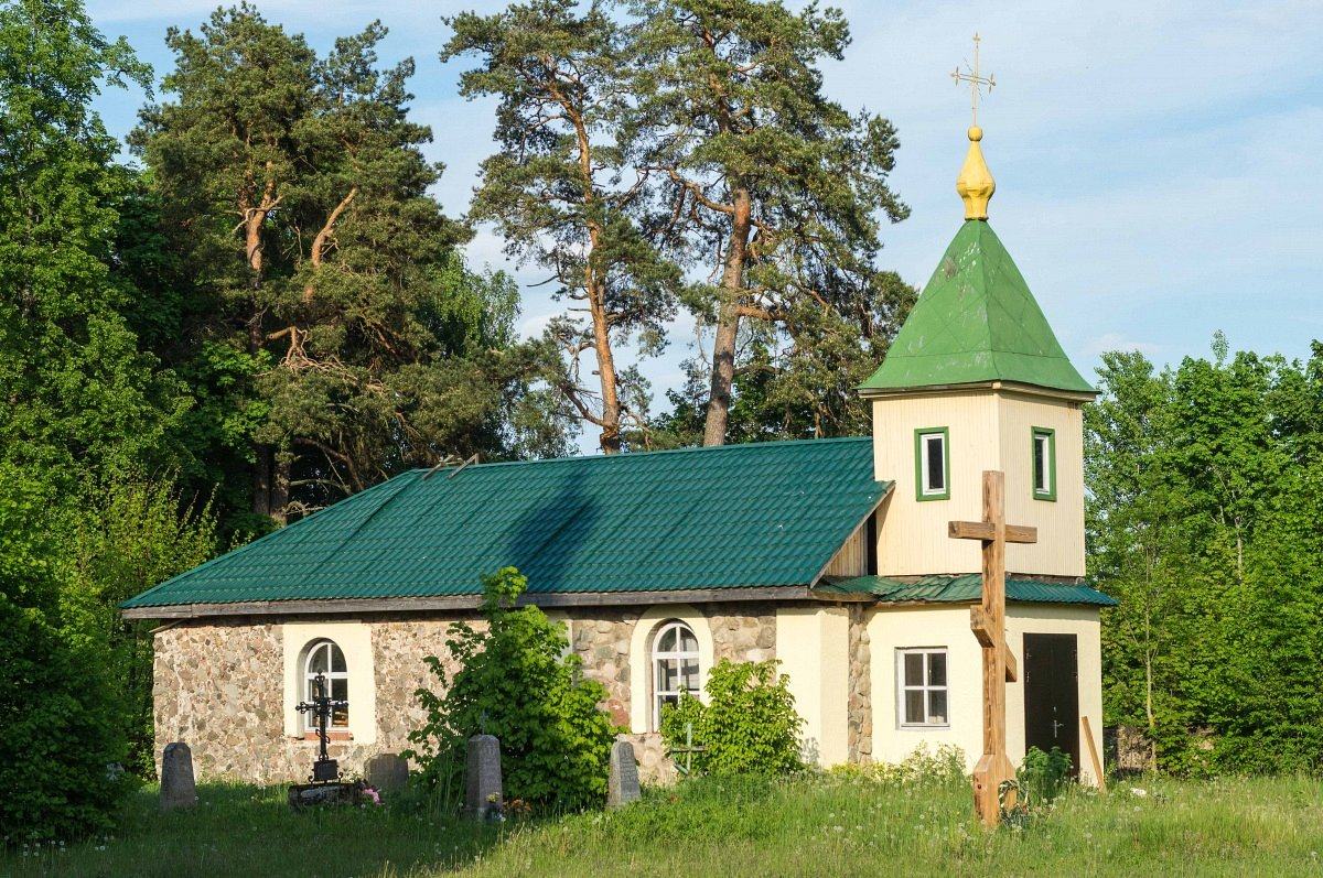 Касута. Капліца